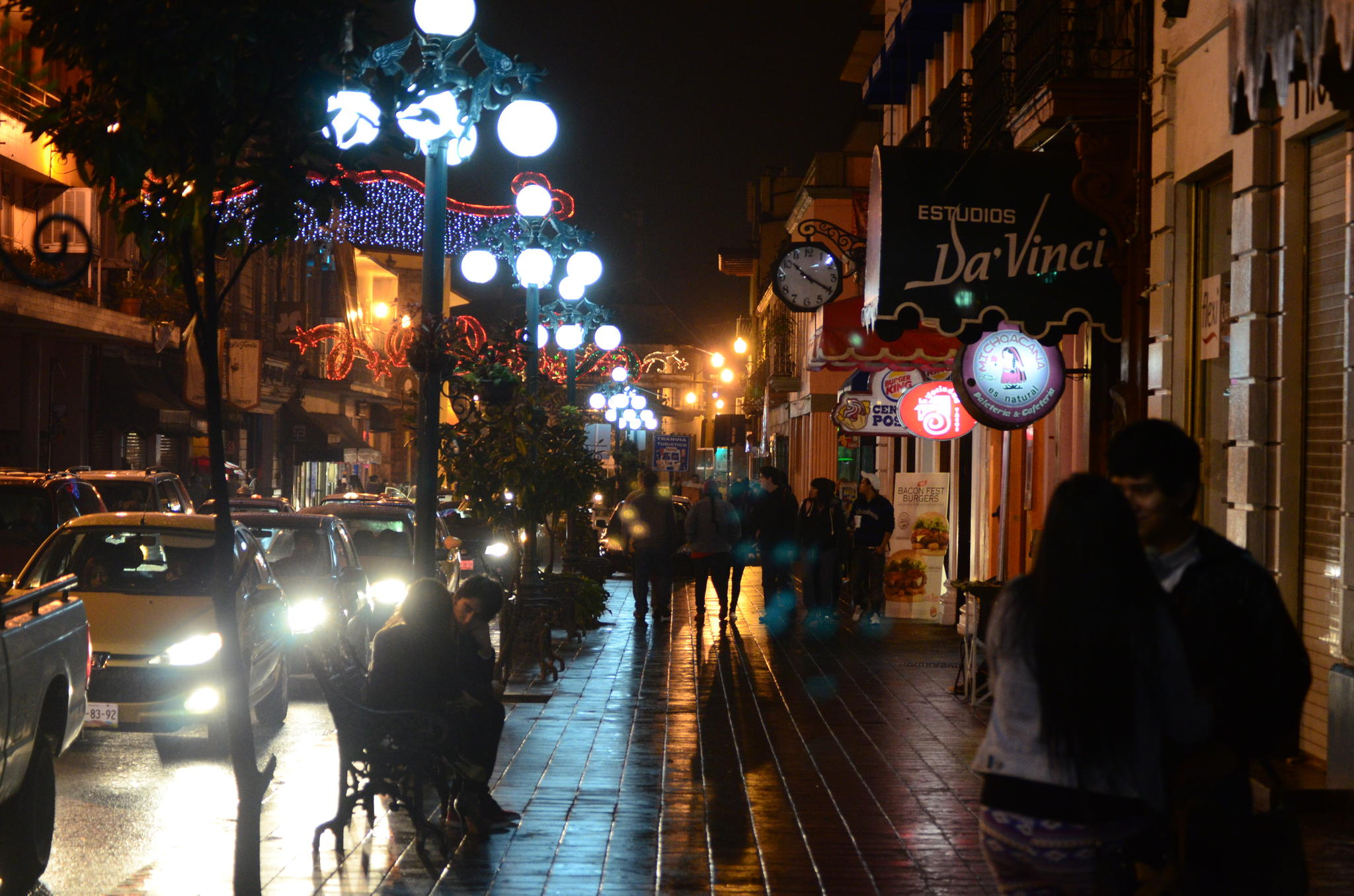 На улице города Халапа-Энрикес зимой 2013 года